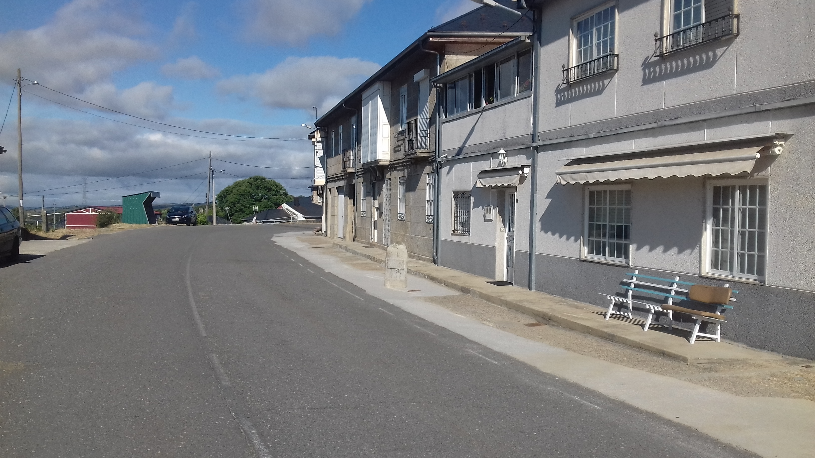 A Vilavella (A Mezquita). Tramo vello da estrada N-525, da que se conserva un fito quilométrico (km 431) xa sen numeración